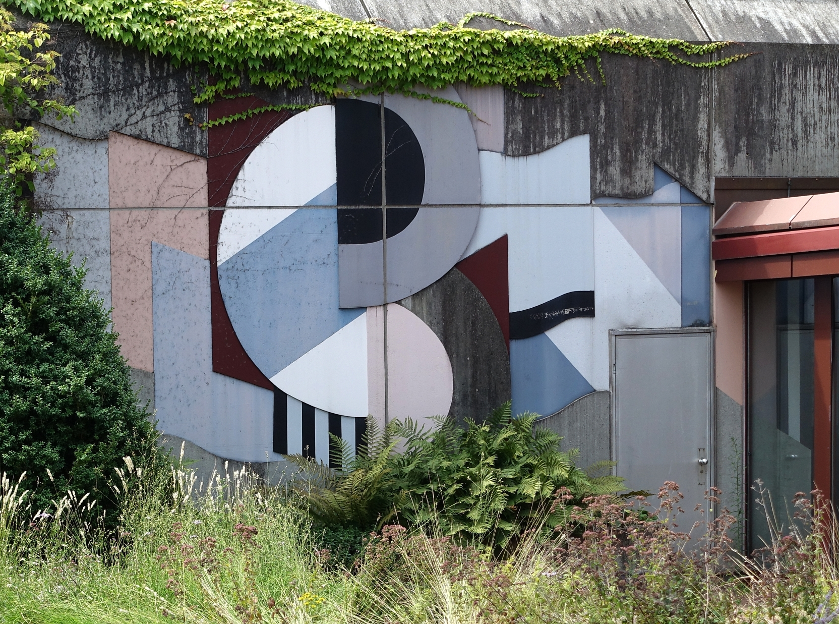 Werke am Bau, Radiostudio Bruderholz, Basel, Relief von Cristina Spoerri-Sprenger (1929–2013), Künstlerin, 2019 zerstört